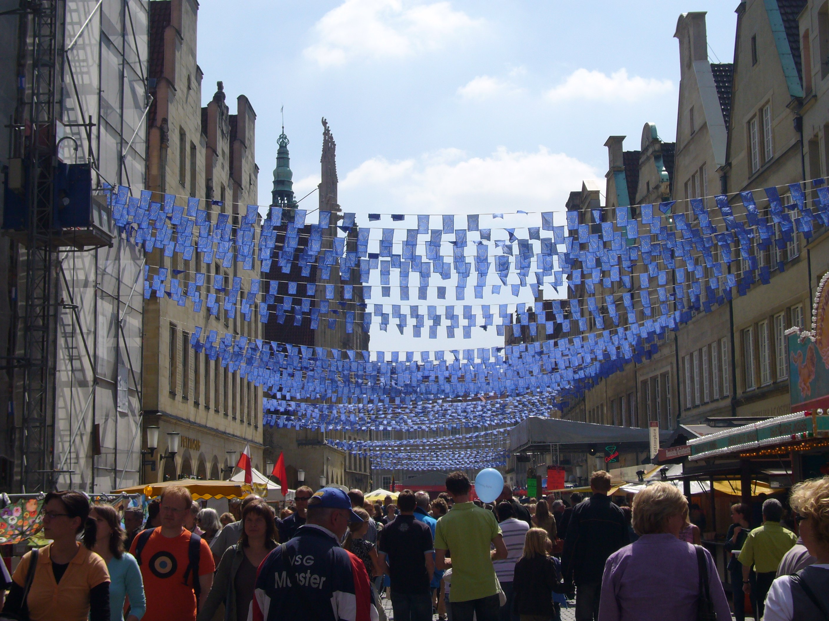 Eurocityfest, Prinzipalmarkt, Münster, Germany